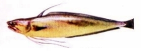 Brótola.